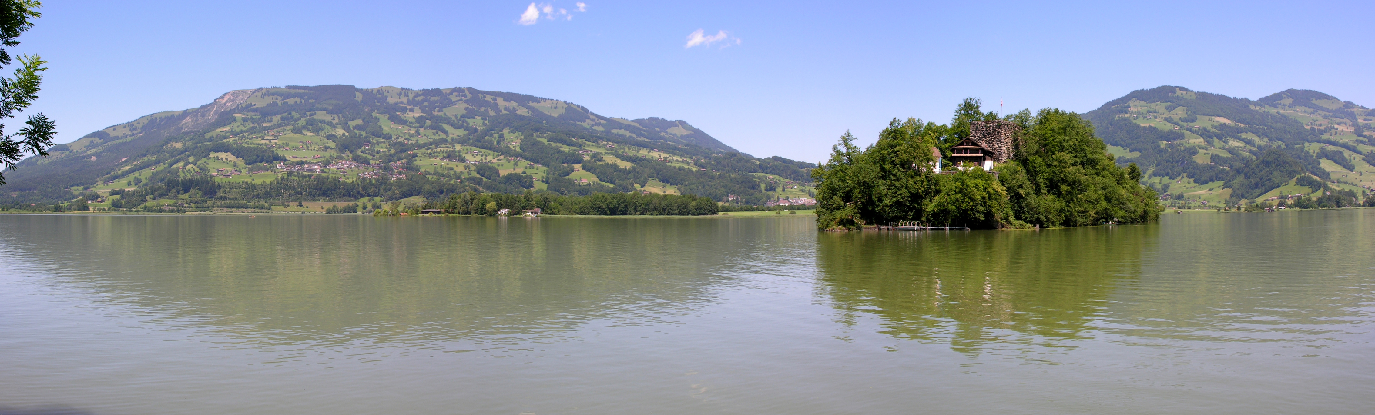 Switzerland, Kanton Schwyz, Lauerzersee